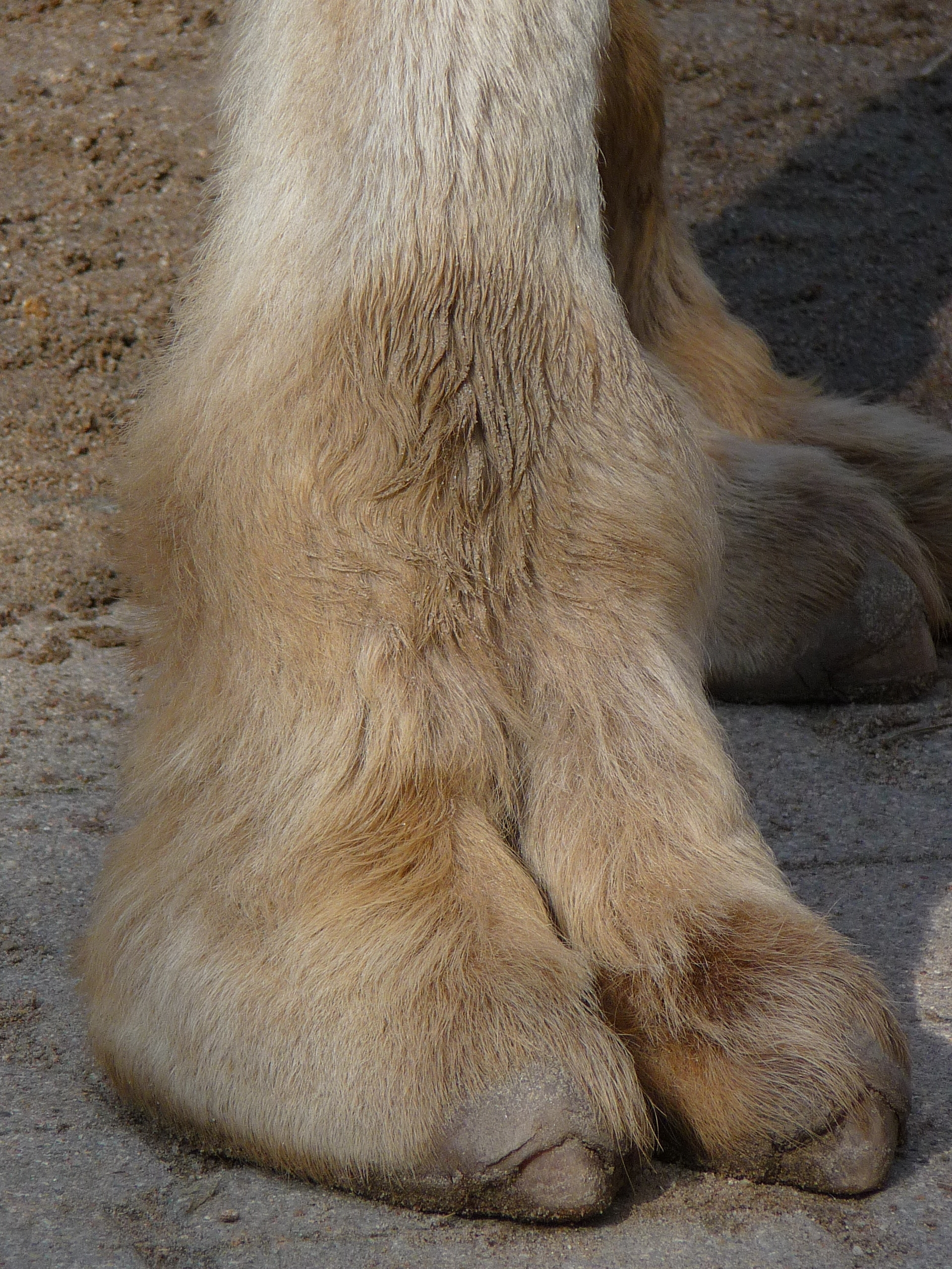 Vorderfuß eines Trampeltiers (Camelus bactrianus)